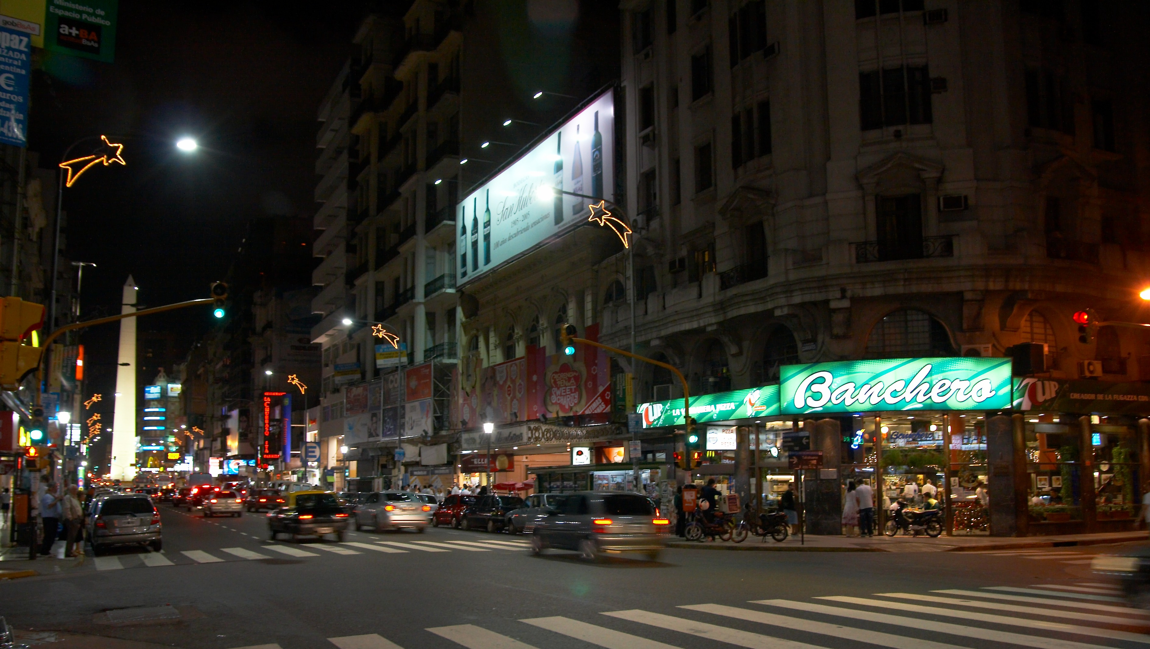 Avenida Corrientes y Talcahuano, barrio de San Nicolás, Buenos Aires, Argentina.